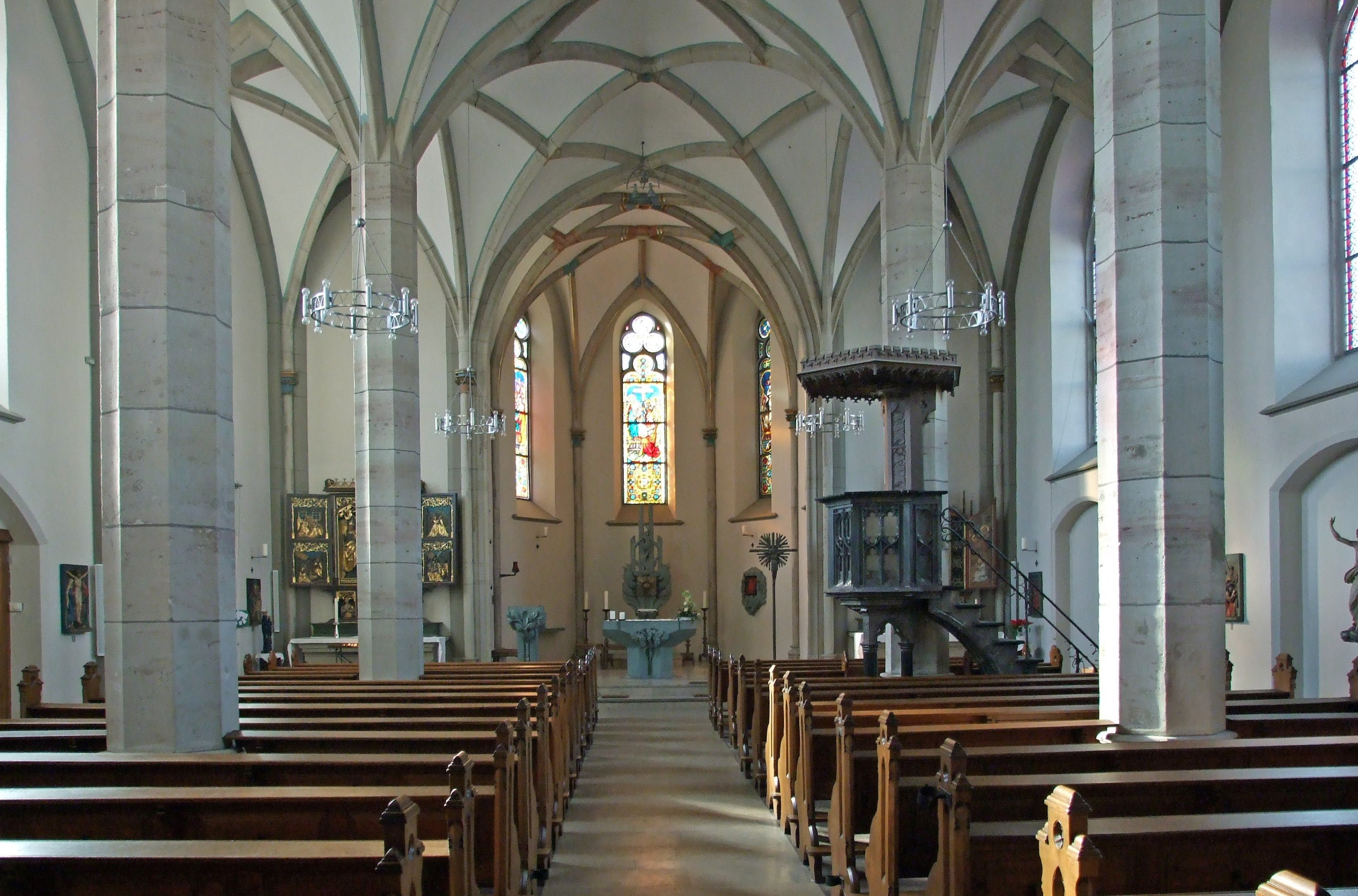 Kirchenschiff von „St. Peter und Paul“, Kronberger Altstadt